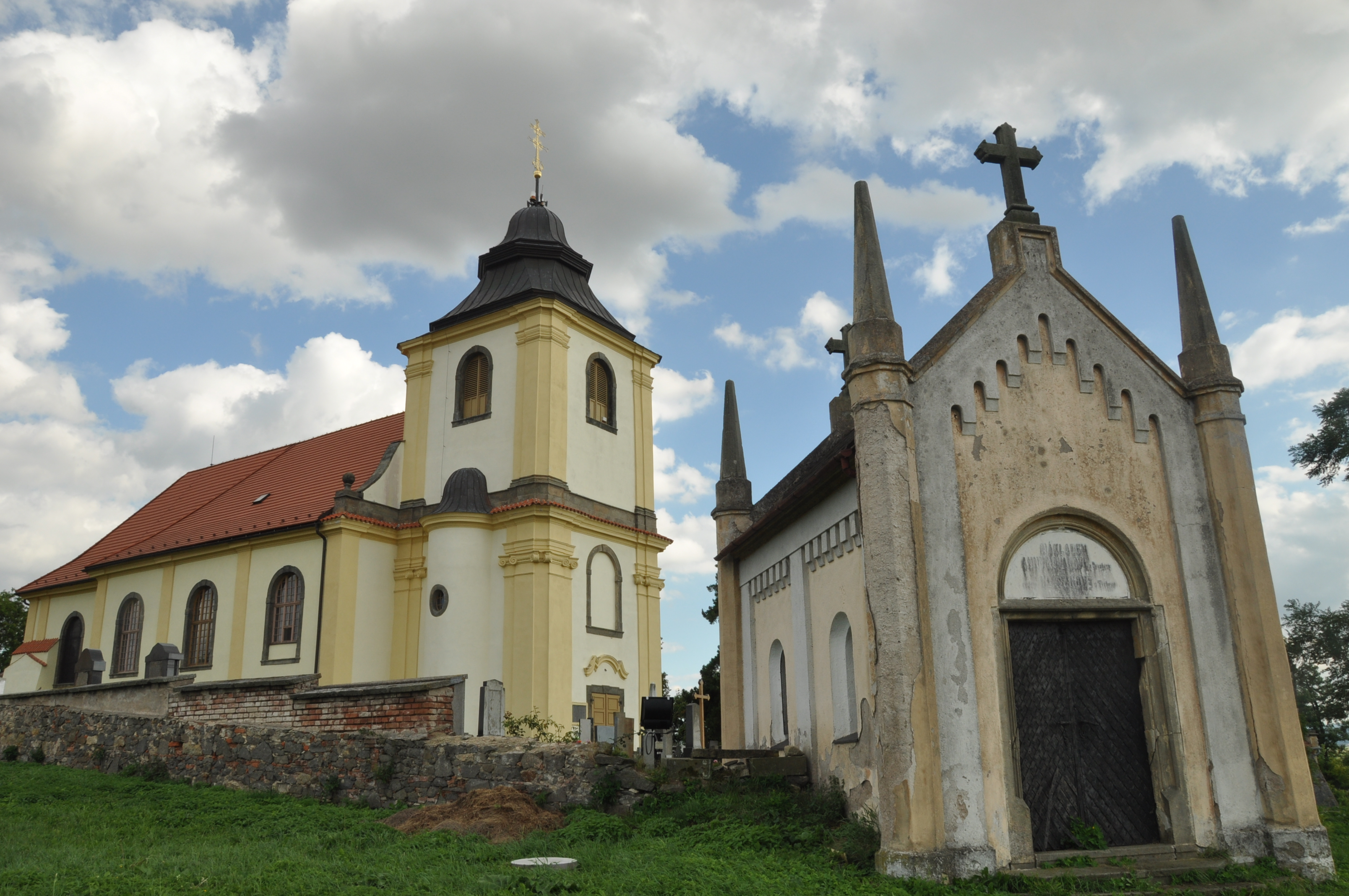 Kostel sv. Václava (Mikulovice), na návrší, jihozápadně od vsi; 2006: tepaný kříž oddělen od podstavce, Mikulovice